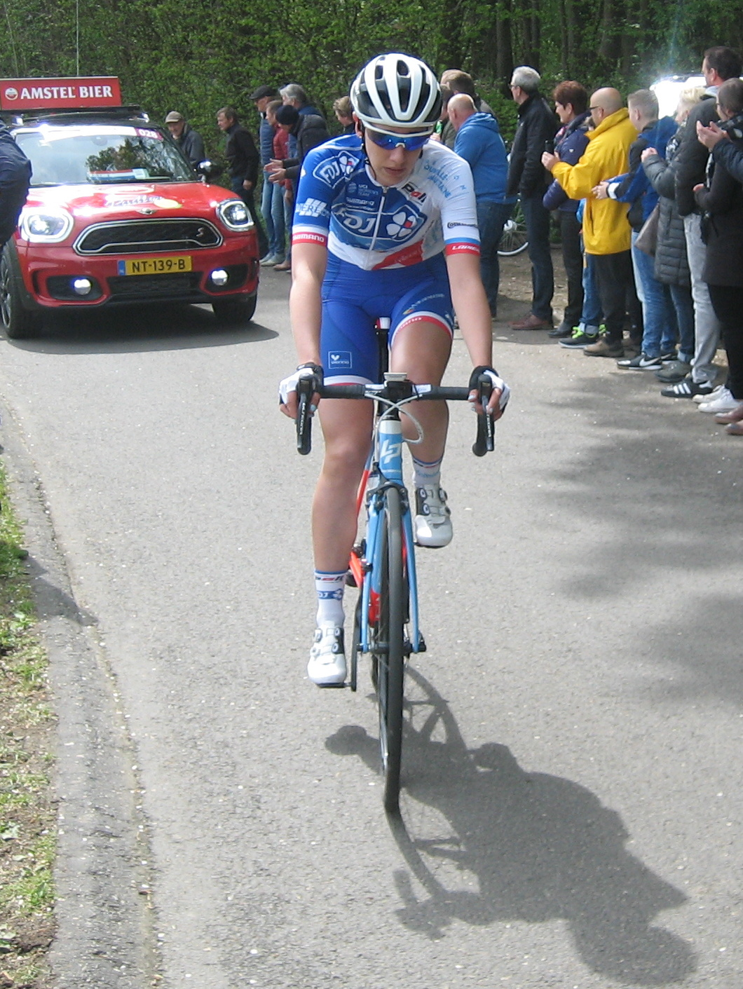 Na 45km, beklimming van de Eyserbosweg, in de Amstel Gold Race Ladies Edition 2017.